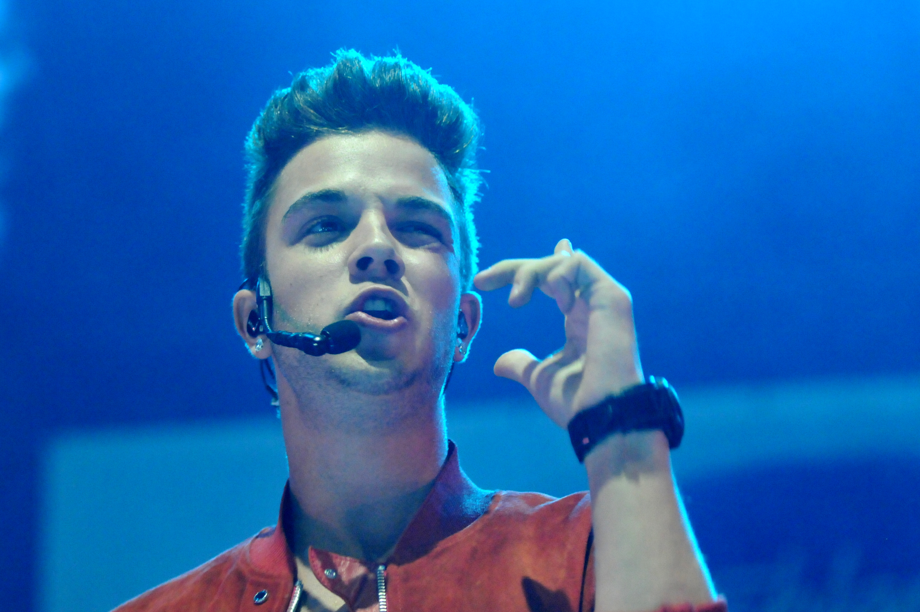 DSDS - Live on Tour. 27. Juli 2014, Stadthalle Wien.